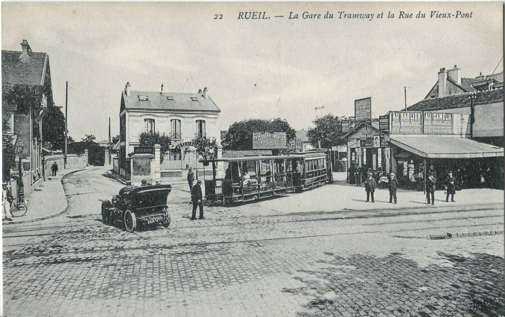 Carte postale ancienne éditée par ND, n°22 :RUEIL - La Gare du Tramway et la Rue du Vieux-Pont.Plan large de la gare de Rueil-Ville du tramway Paris - Saint-Germain